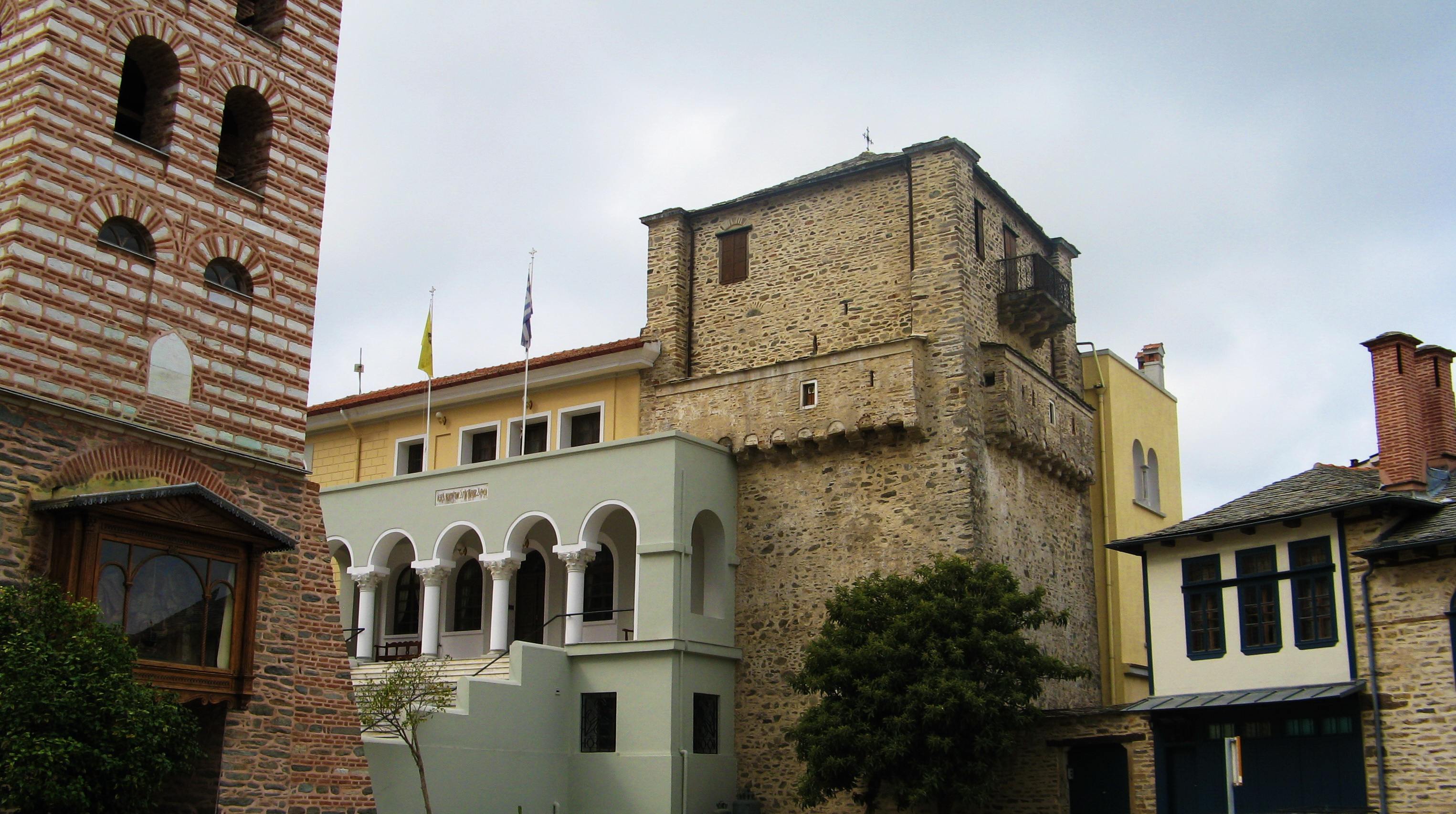 Зграда управе (Протат) Свете горе у Кареји